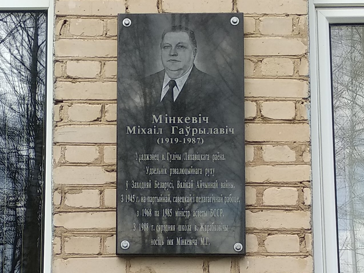 Мемарыяльная шыльда М.Г.Мінкевічу на будынку школы ў Жарабковічах